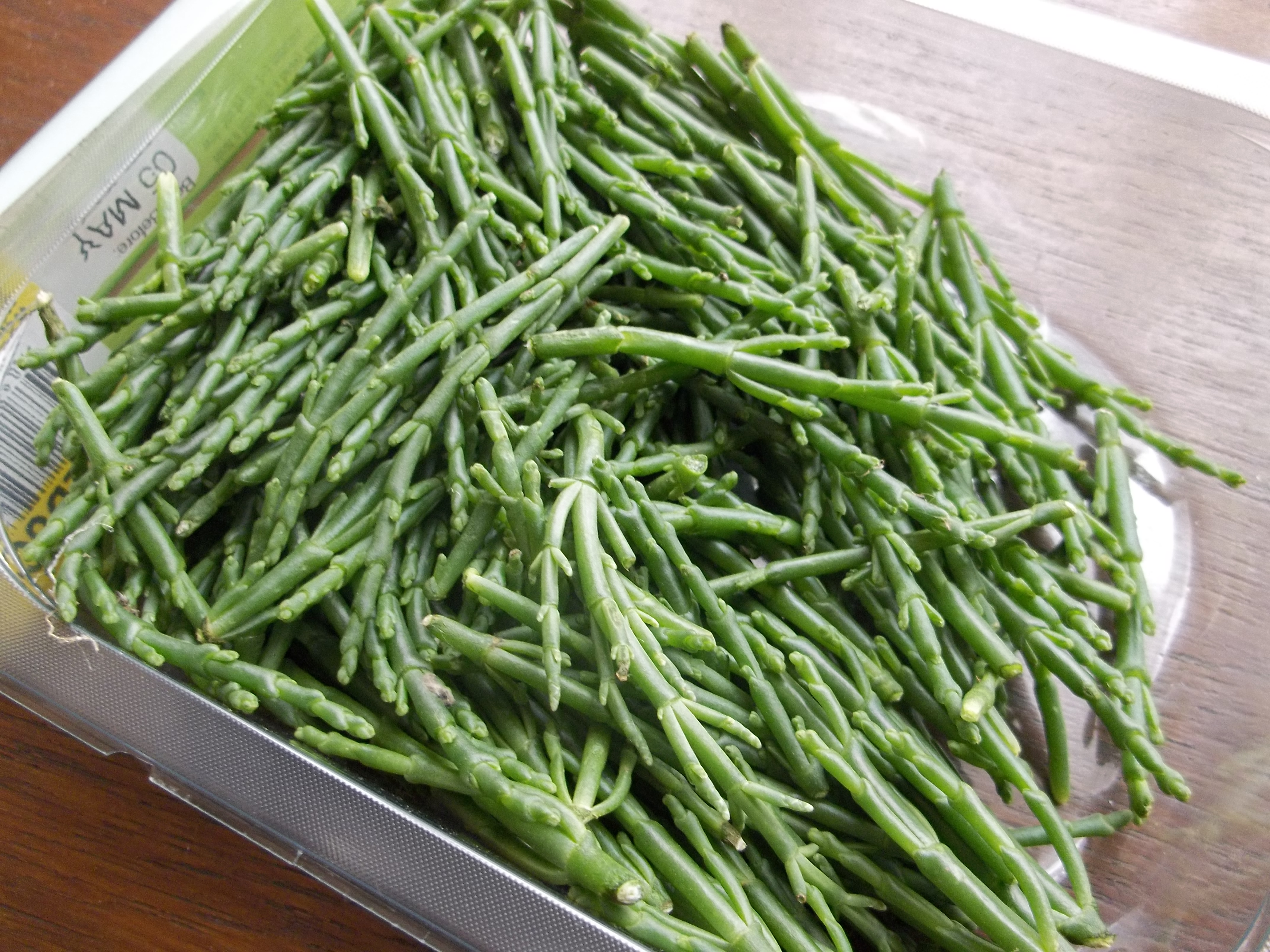 Pajūrinis kritmas (Izraelis)